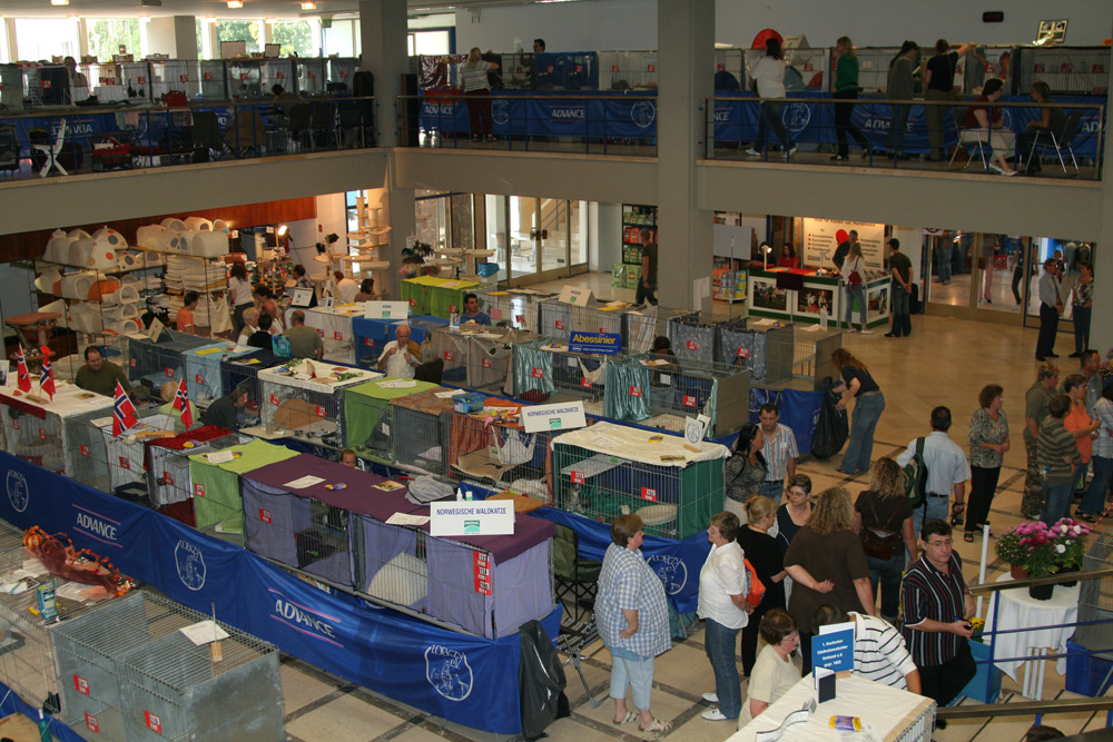 Rassekatzenaustellung des 1. DEKZV e.V. in Koblenz